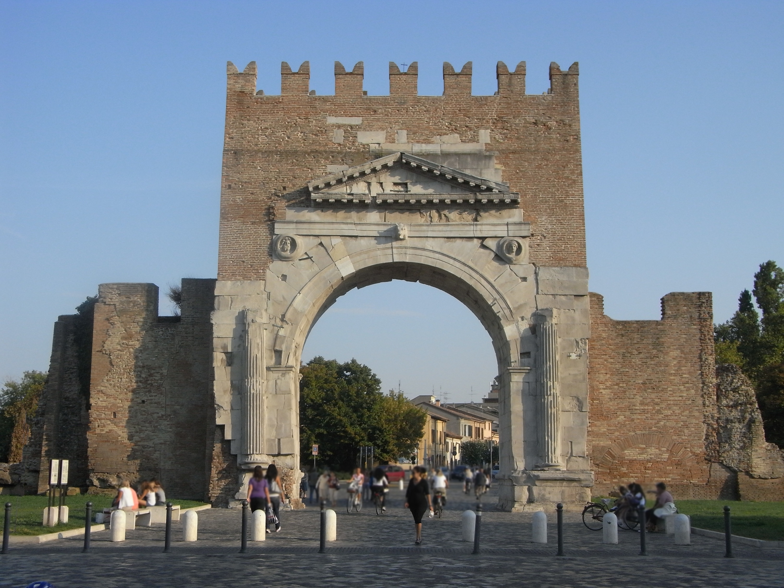 Rimini, Augustusbogen von Südosten